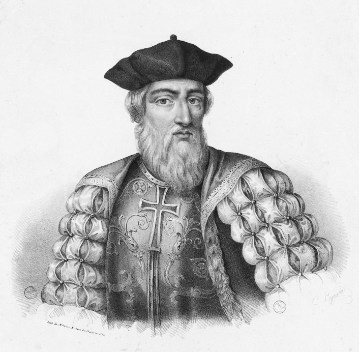 Vasco da Gama, navegador e explorador português.